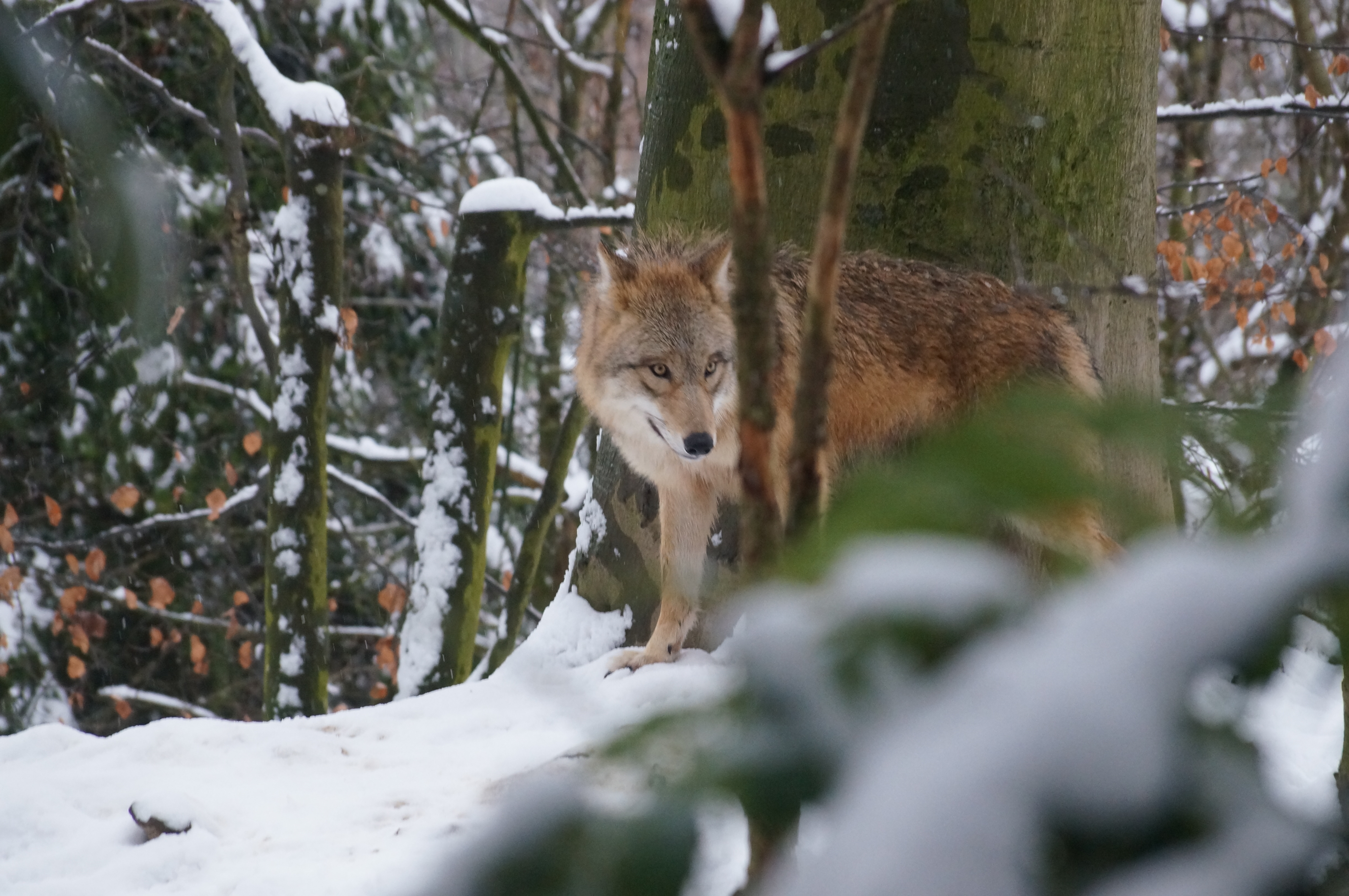 Zoo Zürich Mongolischer Wolf